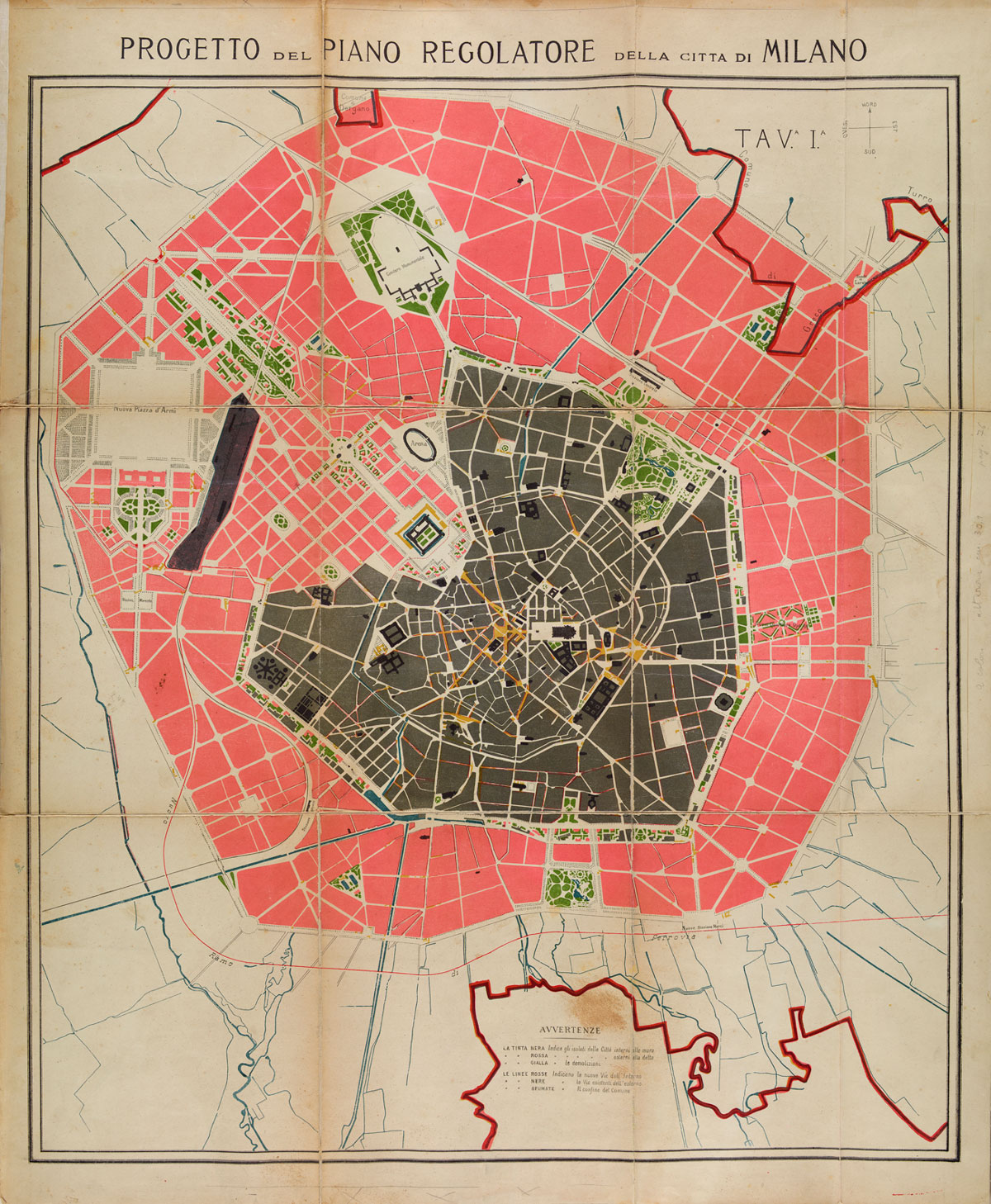 La bozza di piano redatta nel 1884 dall'ing. Cesare Beruto.